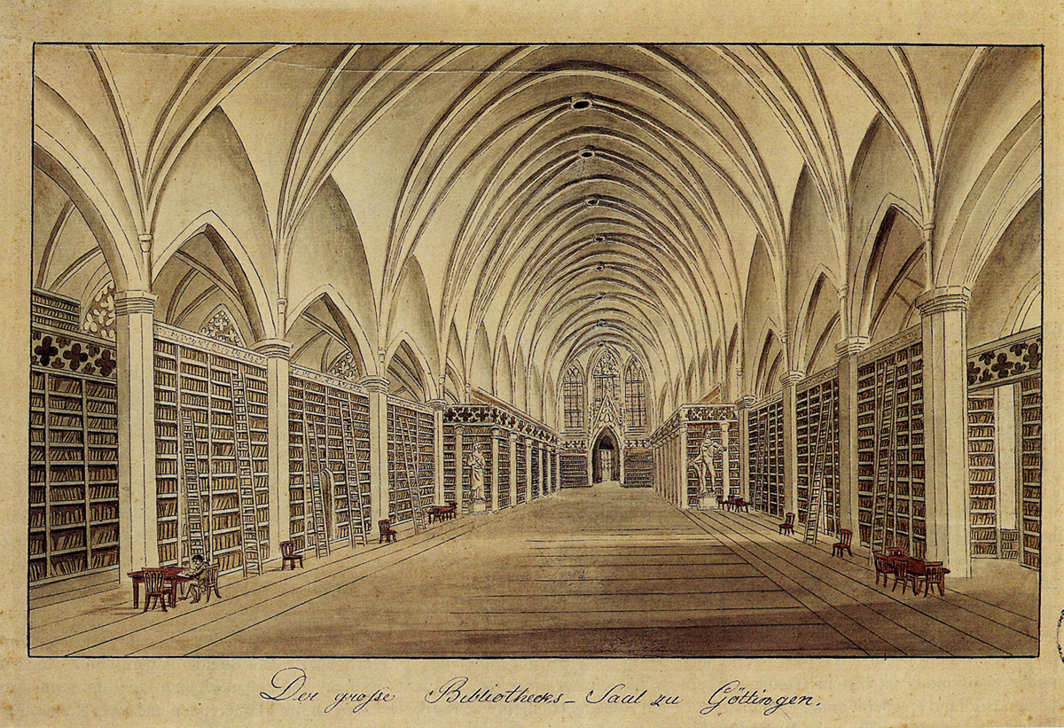 zugeschrieben: Großer Bibliothekssaal der Göttinger Universitätsbibliothek